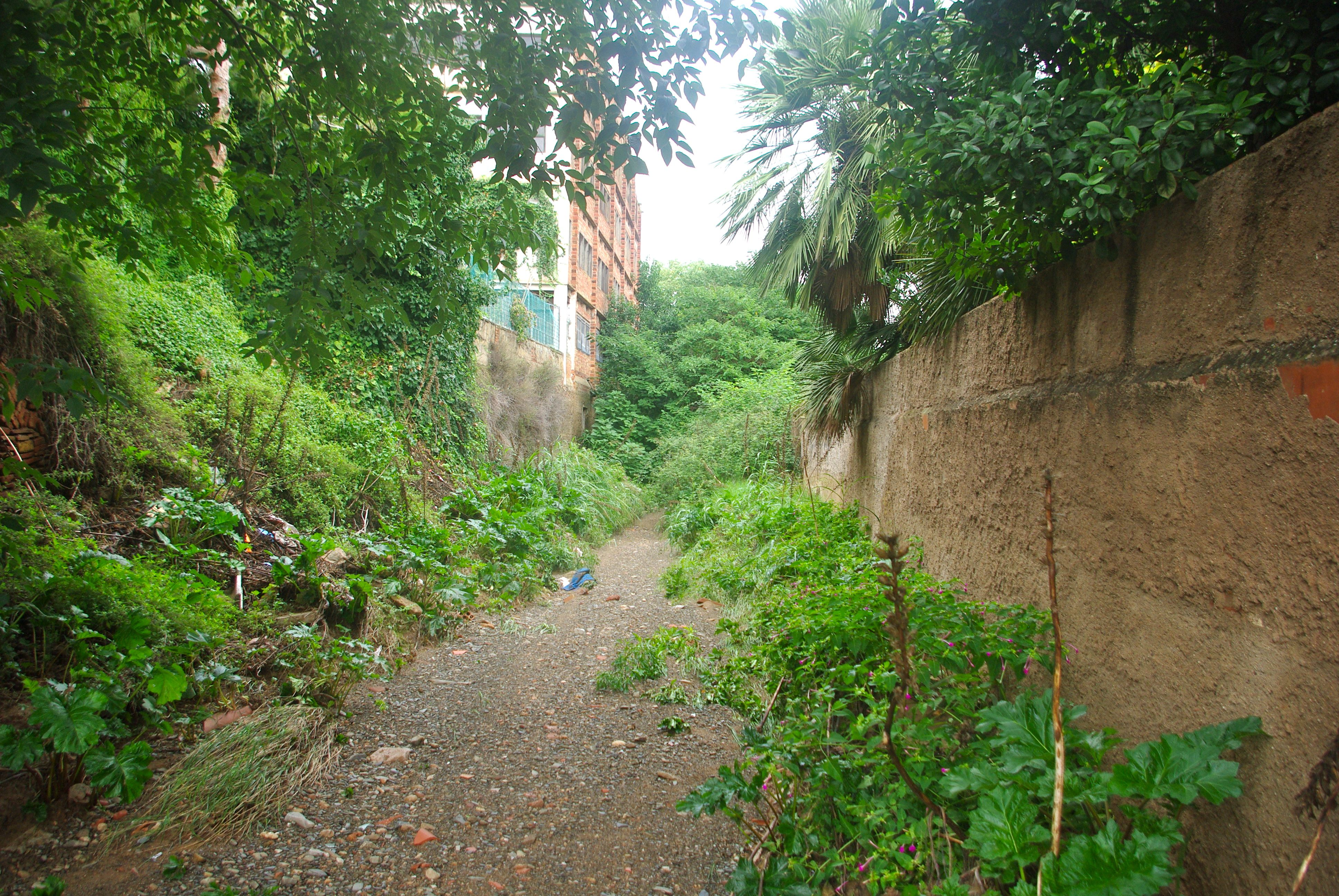 El barranc dels Gossos vora els Xalets Quintana, al terme de Reus